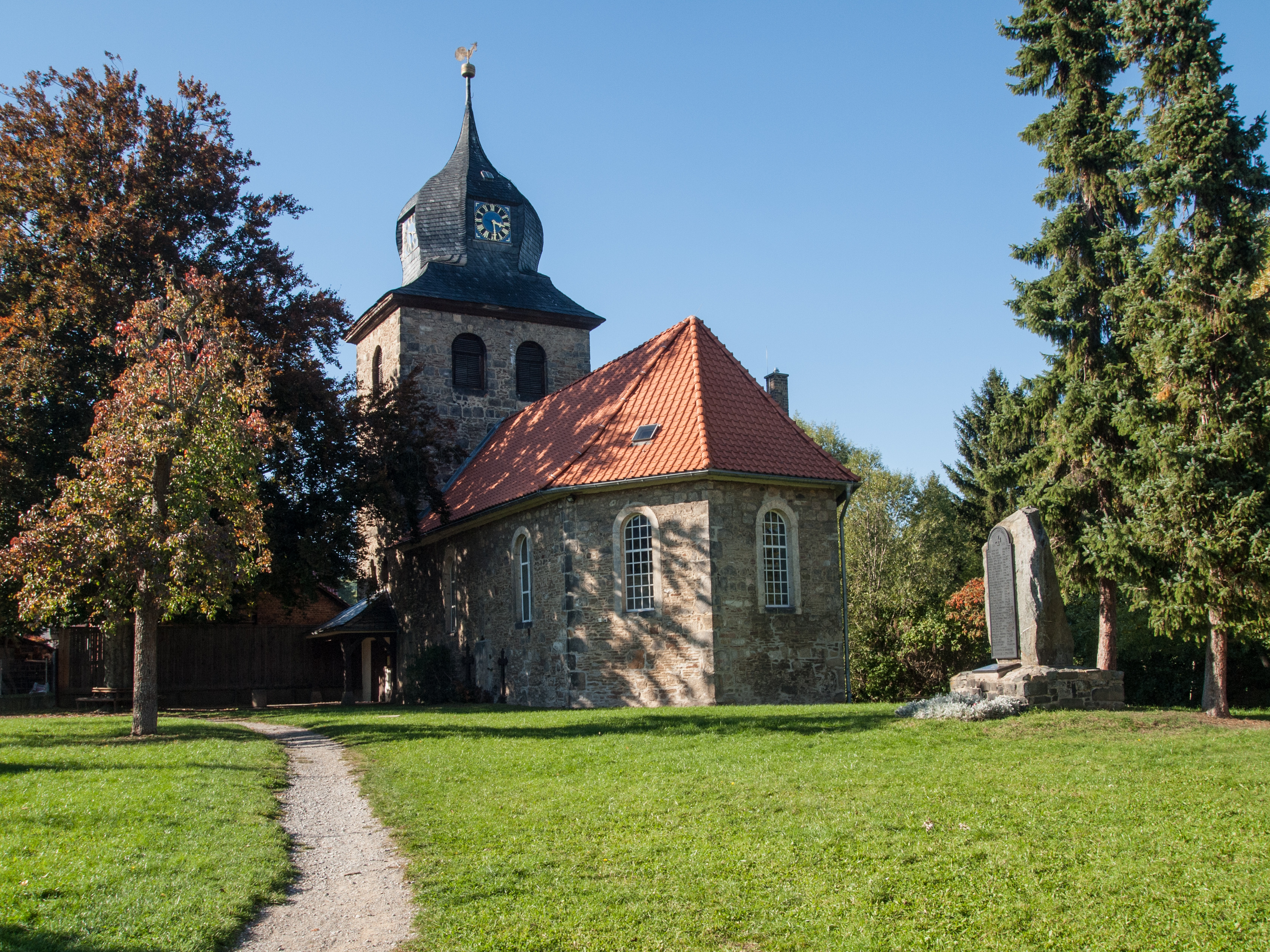 Cattenstedt (Stadt Blankenburg, Landkreis Harz; Sachsen-Anhalt) Dorfkirche